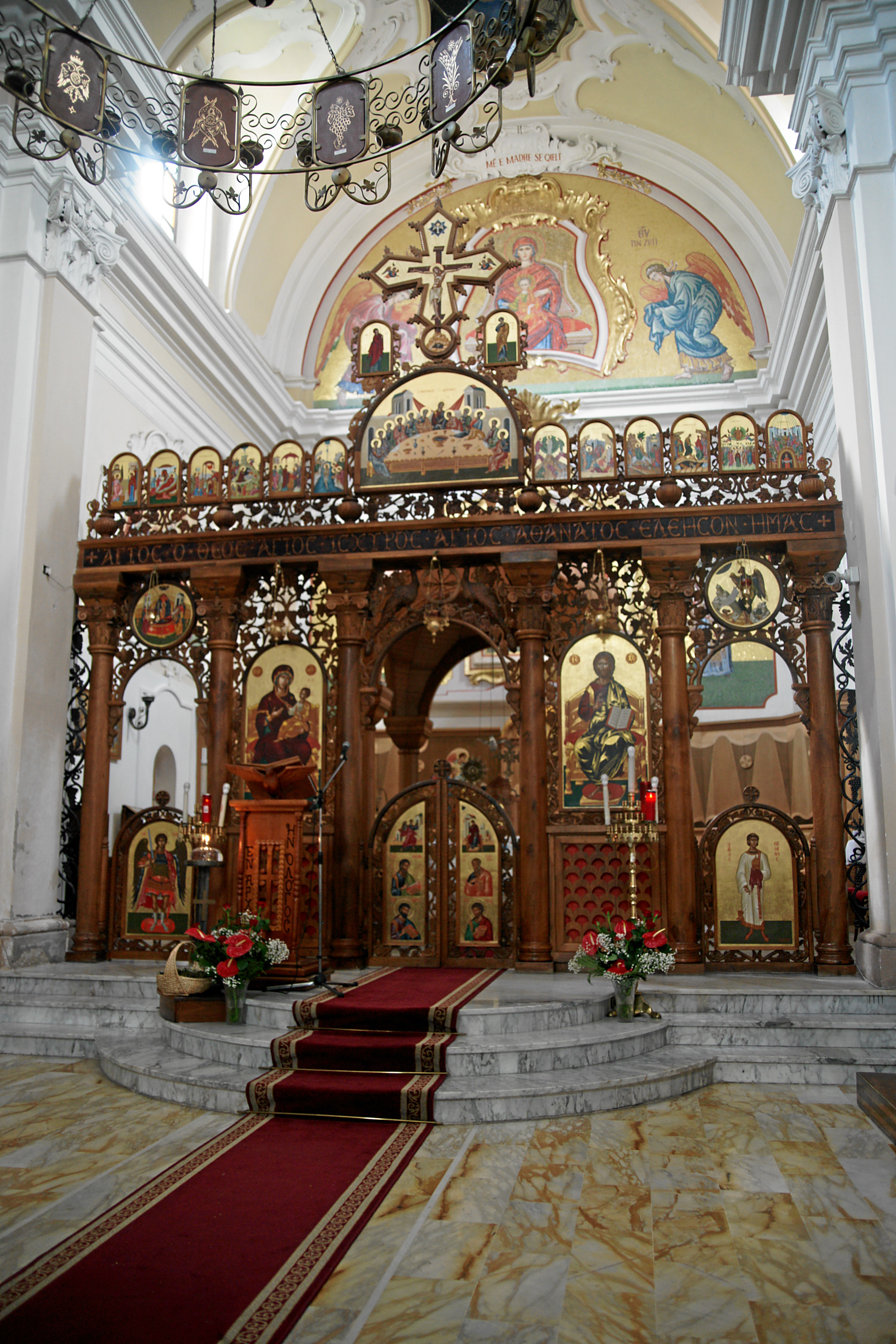 Chiesa madre, Civita: Ikonostase